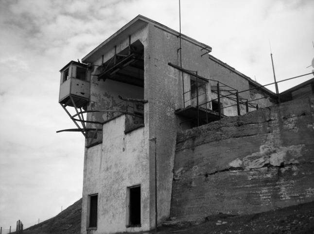 Arrivo funivia base operativa Monte Telegrafo